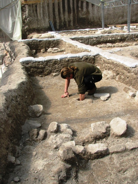 Excavation in City of David Givaty parking lot Jerusalem, Israel חפירות בחניון גבעתי בעיר דוד. הארכאולוגים האחראים הם דורון בן עמי ויאנה צ'חנוביץ קנקן מהתקופה העבאסית. נמצא בשלמות באתרו. היד של החופר מוכנסת לתוך פי הקנקן